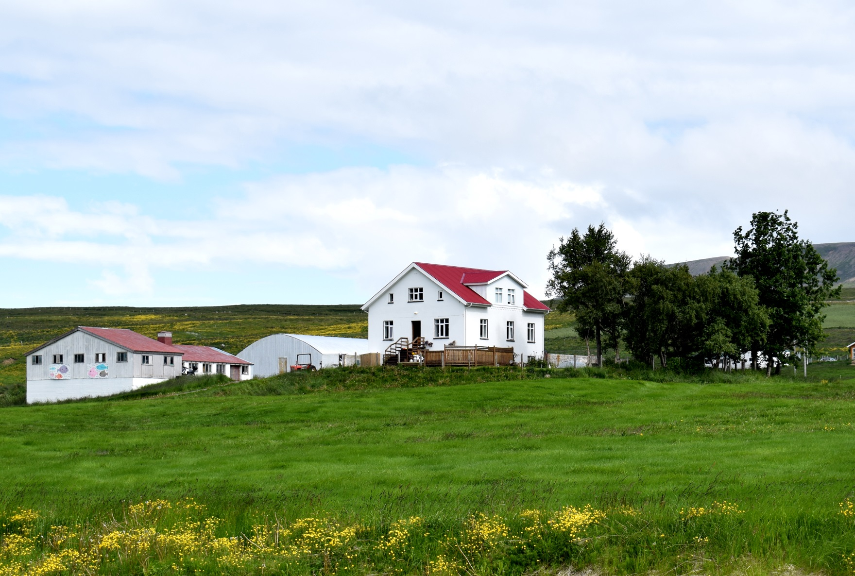 Hánefsstaðir í Svarfaðardal að sumri